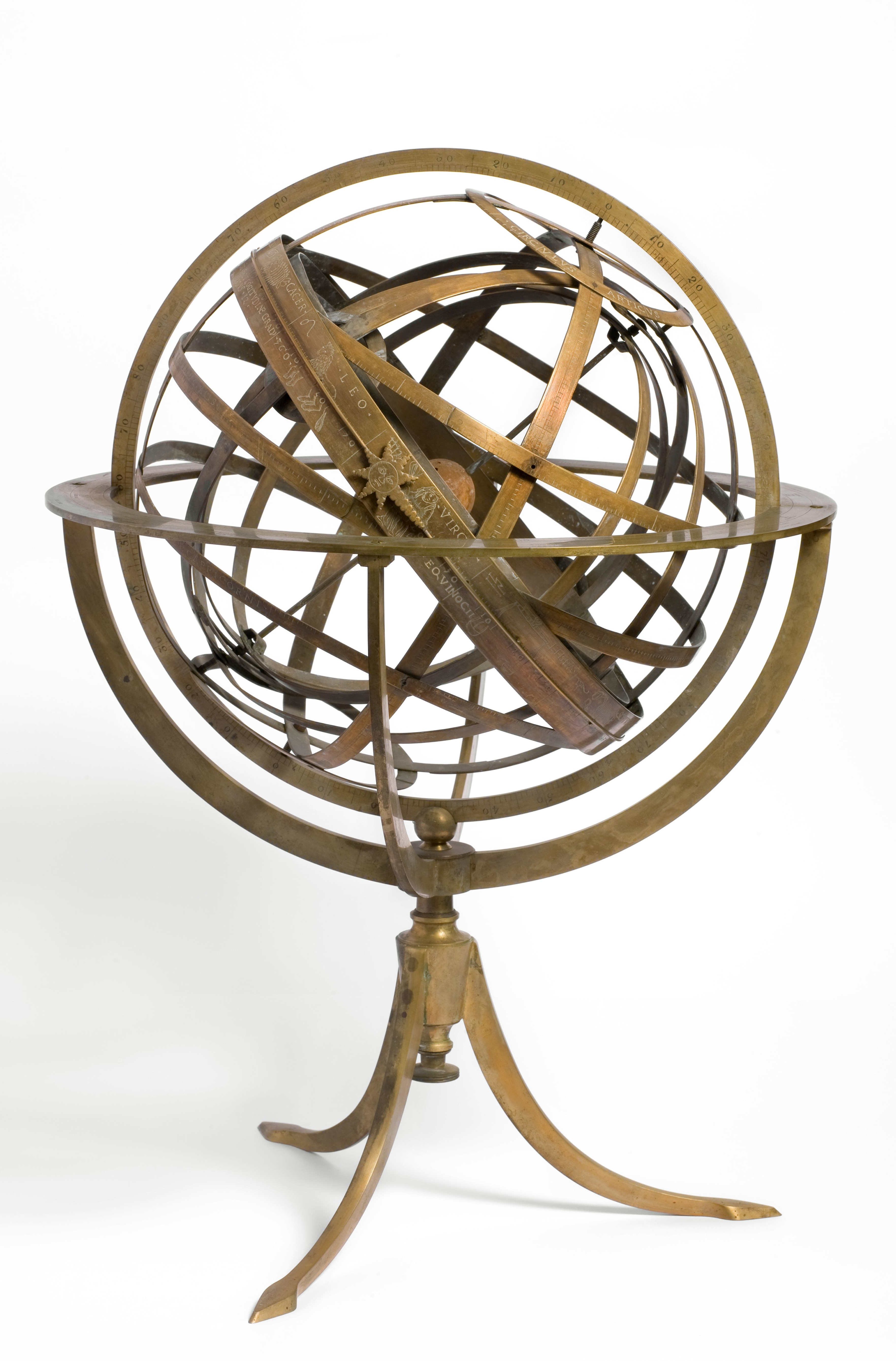 Sfera armillare non firmata, XVI secolo